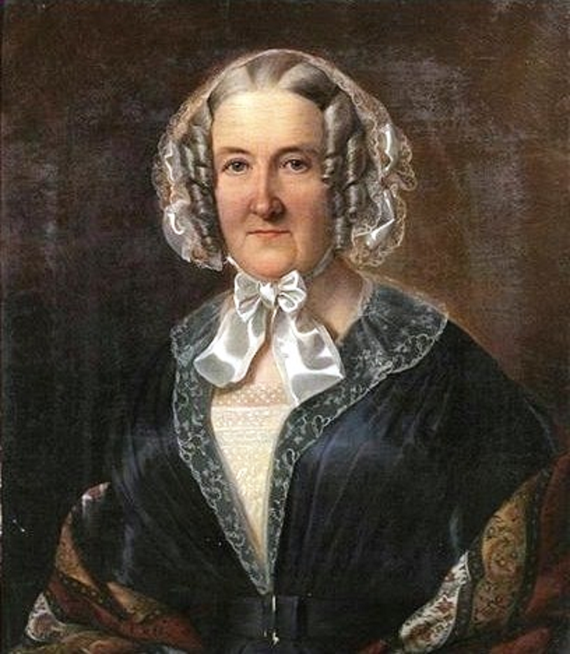 Bildnis Barbara von Berckholtz geb. Schröder (* 20. März 1785 in Riga; † 23. Februar 1859 Ortenberg/Baden), Gattin des Gabriel Leonhard von Berckholtz, der Mutter der Künstlerin, um 1850